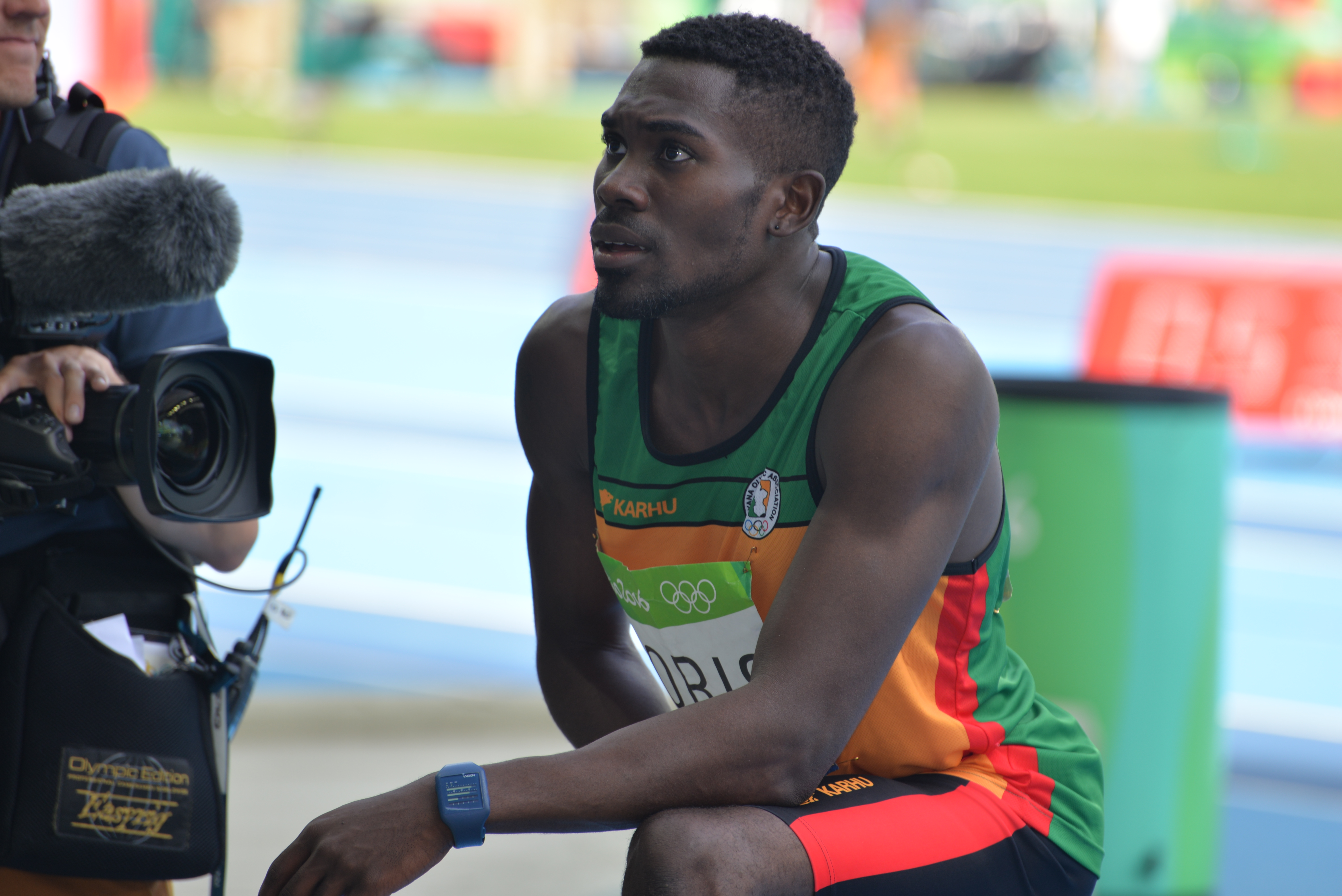 Finale du concours du triple saut à Rio 2016